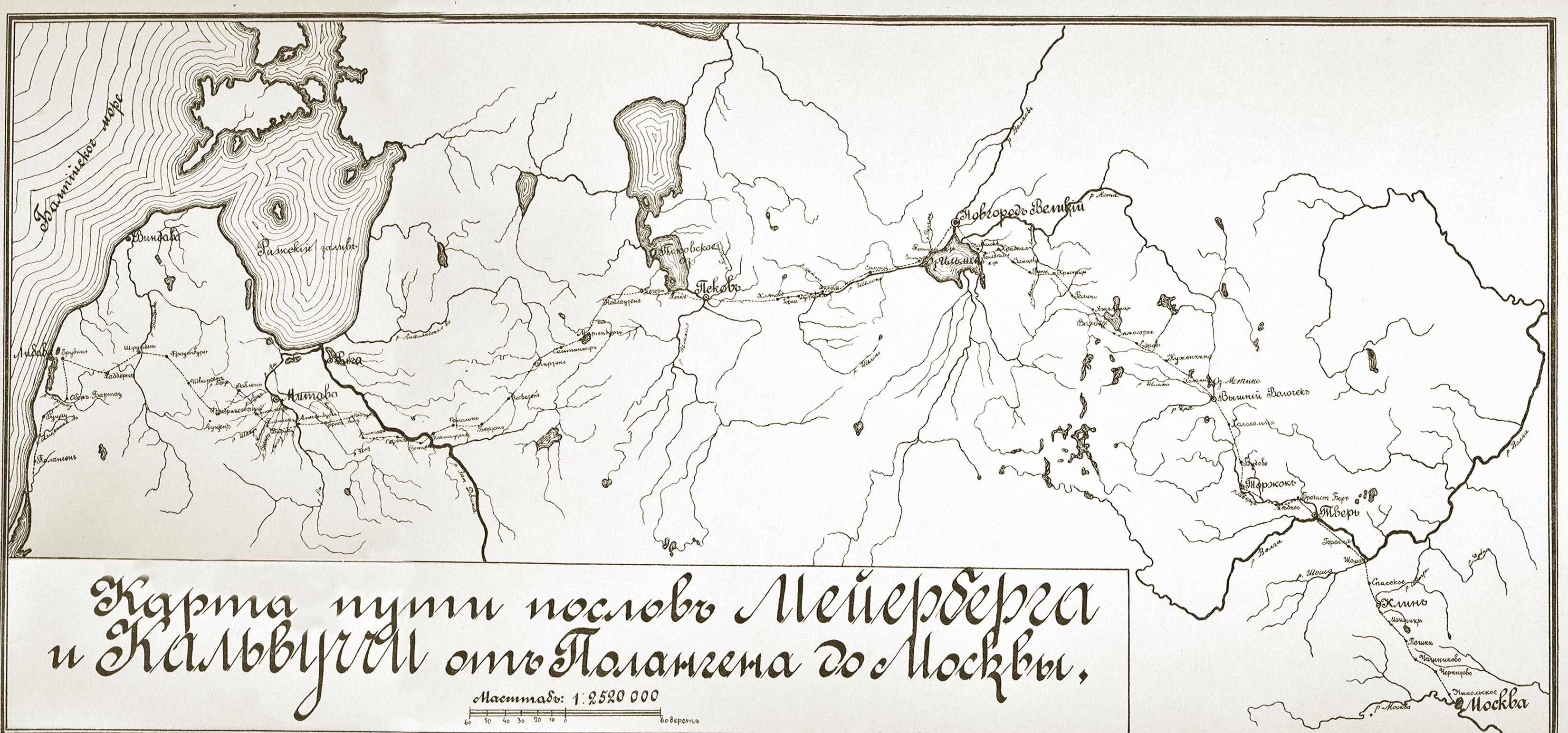 Карта пути посольства Мейерберга.